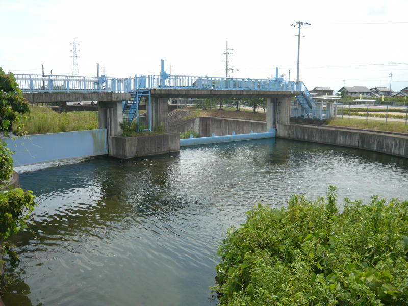 本巣市上保、席田用水分水口。ここで「席田用水から糸貫川を」分流する。手前と左が席田用水、右が糸貫川である。